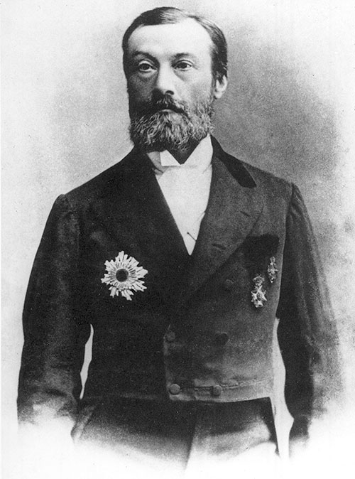 Porträtfoto von Hermann Roesler